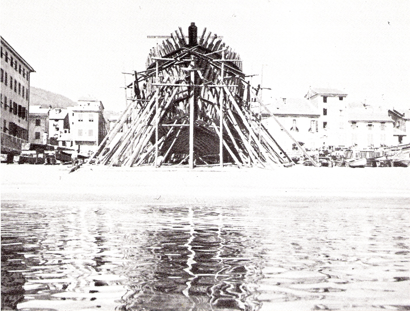 Fotografia di fine XIX secolo sulla costruzione di uno scafo presso il cantiere navale Baglietto sulla spiaggia di Varazze (Savona)